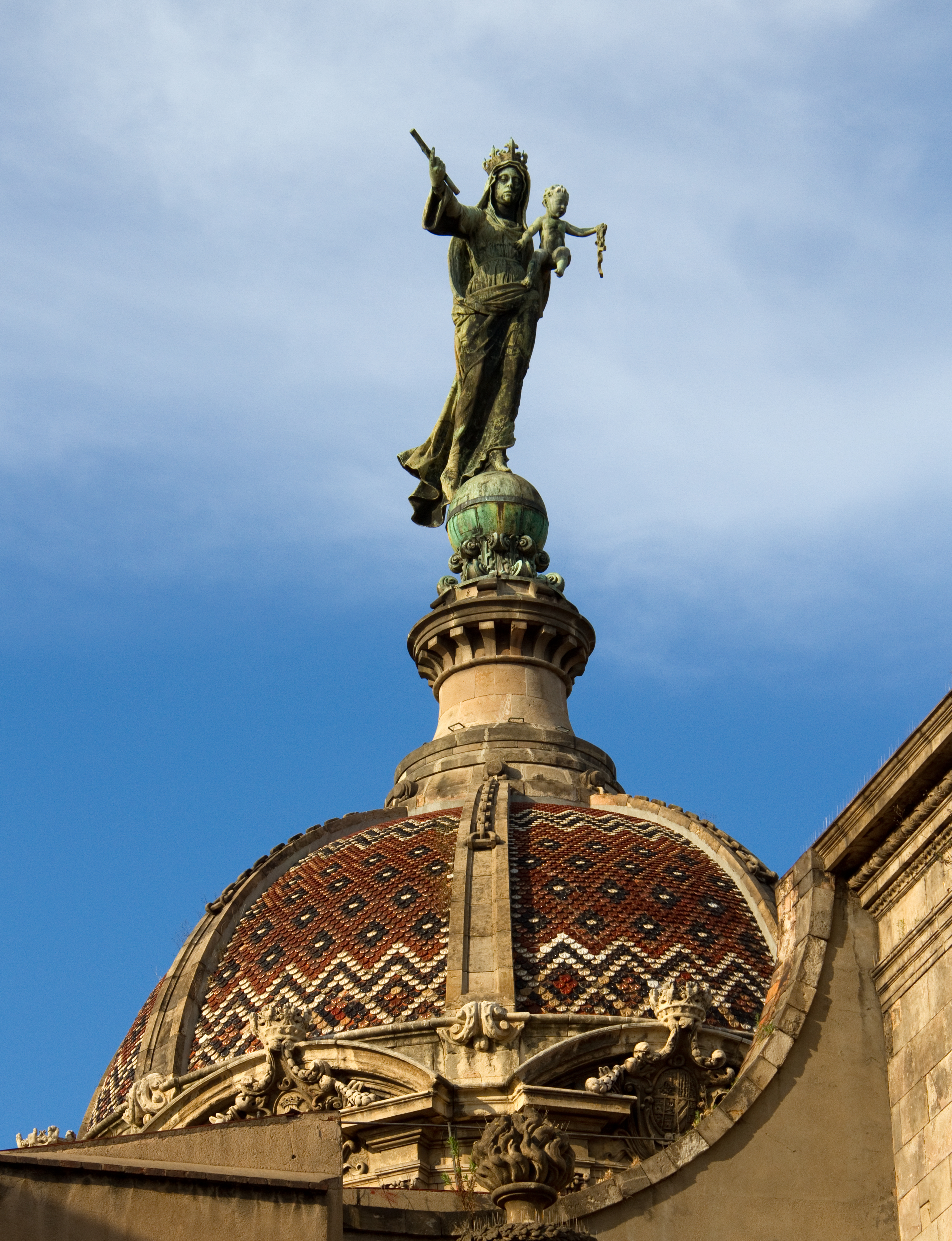 Building 12